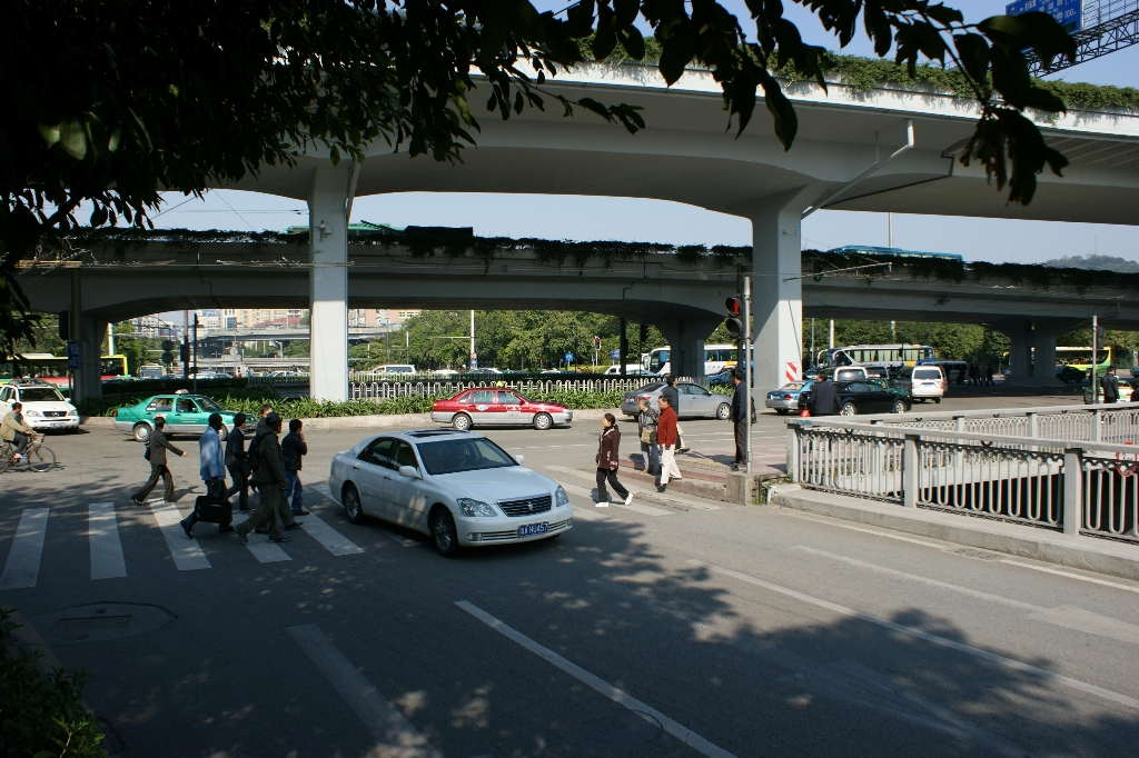 大北立交现貌